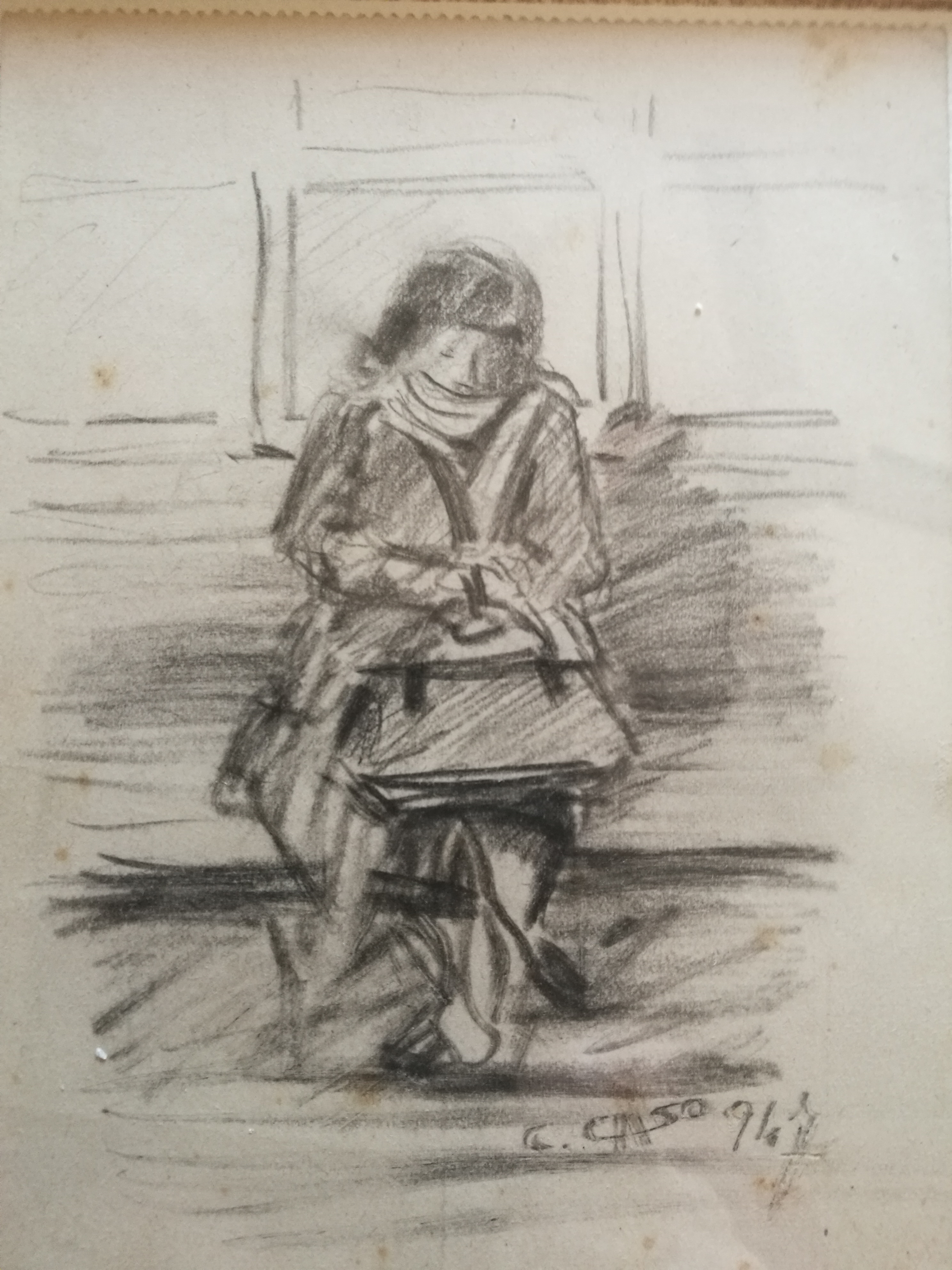 Disegno. 1949